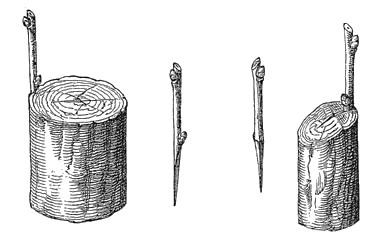 [links] Pfropfen in die Rinde. [rechts] Pfropfen in den Spalt.